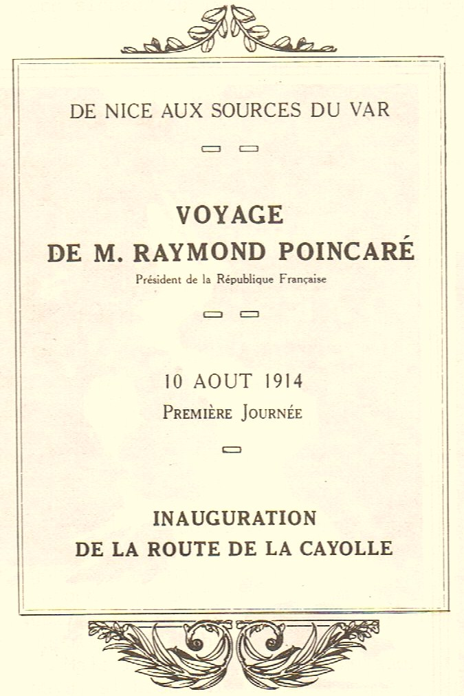 Page de couverture de la plaquette officielle de l'inauguration de la route du col de La Cayolle prévue le 10 août 1914 par le Président Raymond Poincaré en personne. Mais, après Sarajevo et l'imminence du déclenchement de la guerre de 1914-18, le président de la République, retenu à Paris, ne put venir à Entraunes